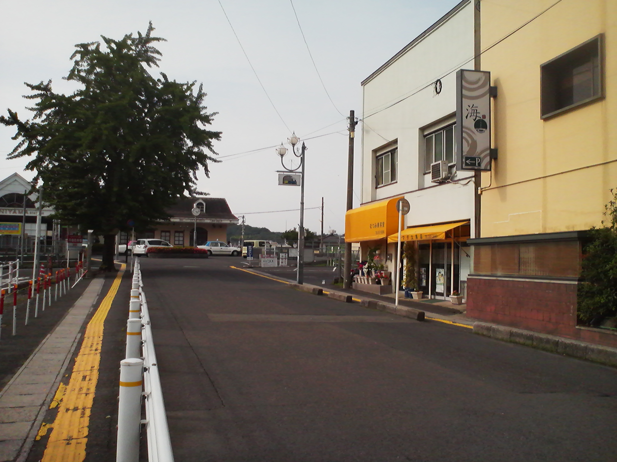 国道225号谷山駅前交差点から谷山駅を望む（鹿児島県道212号谷山停車場線）。